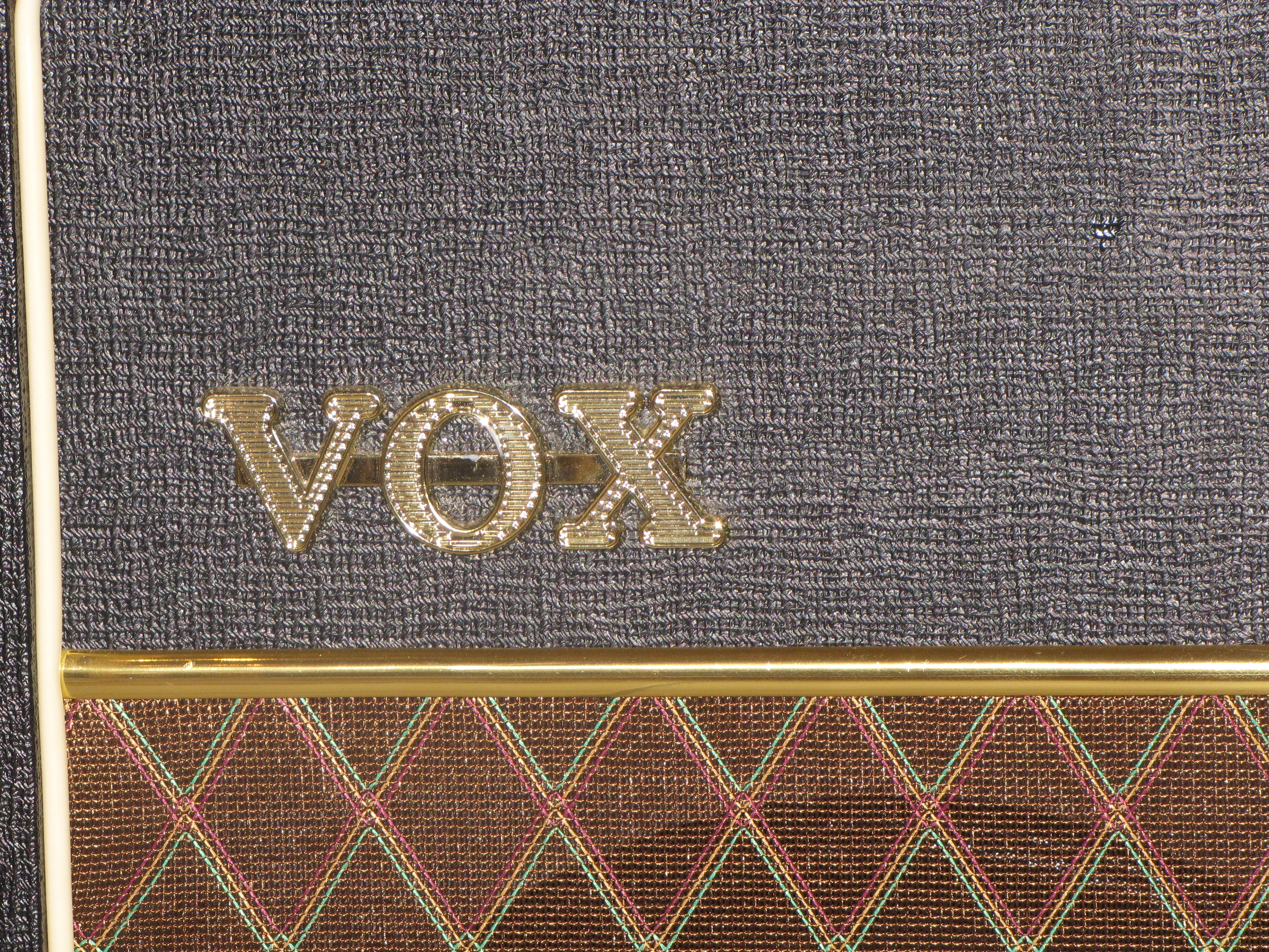 Vox Logo